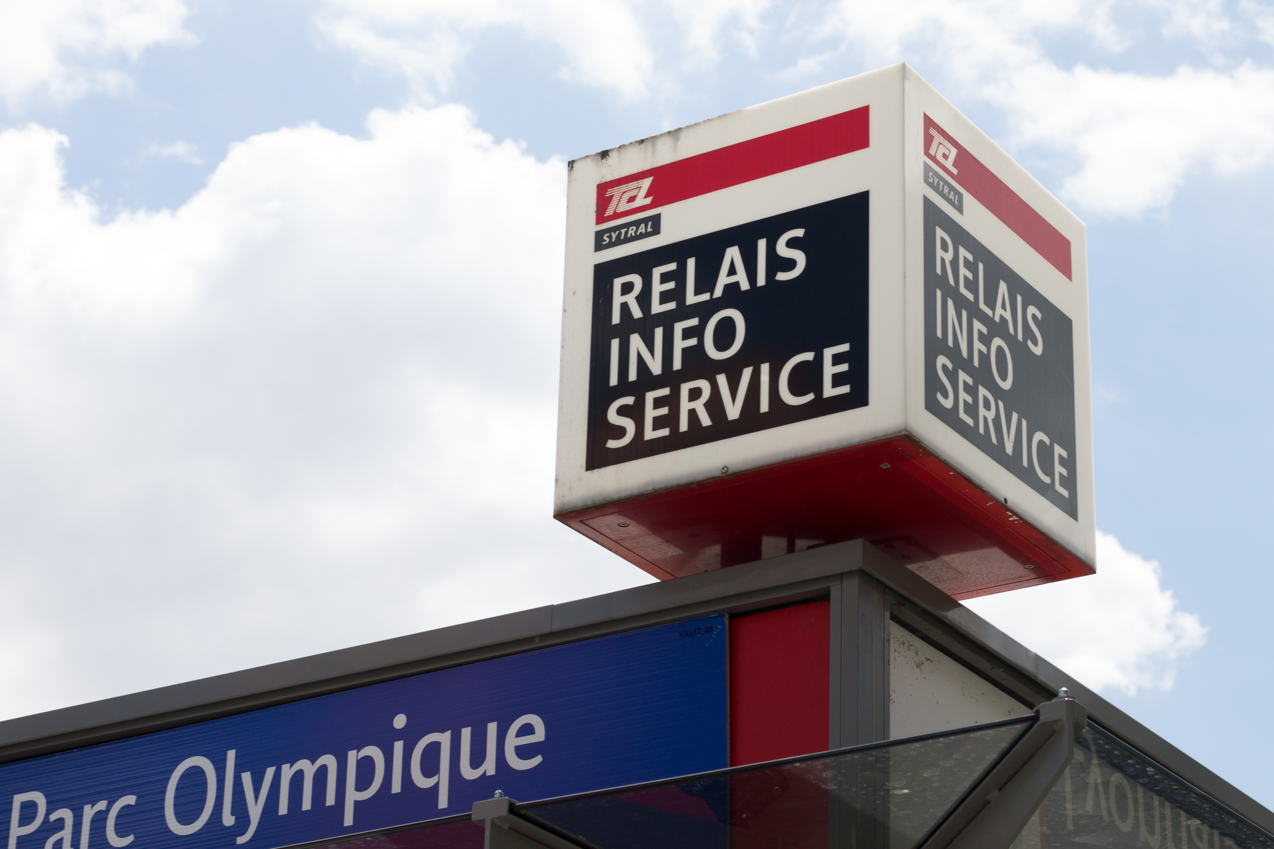 Enseigne Point Info Service TCL